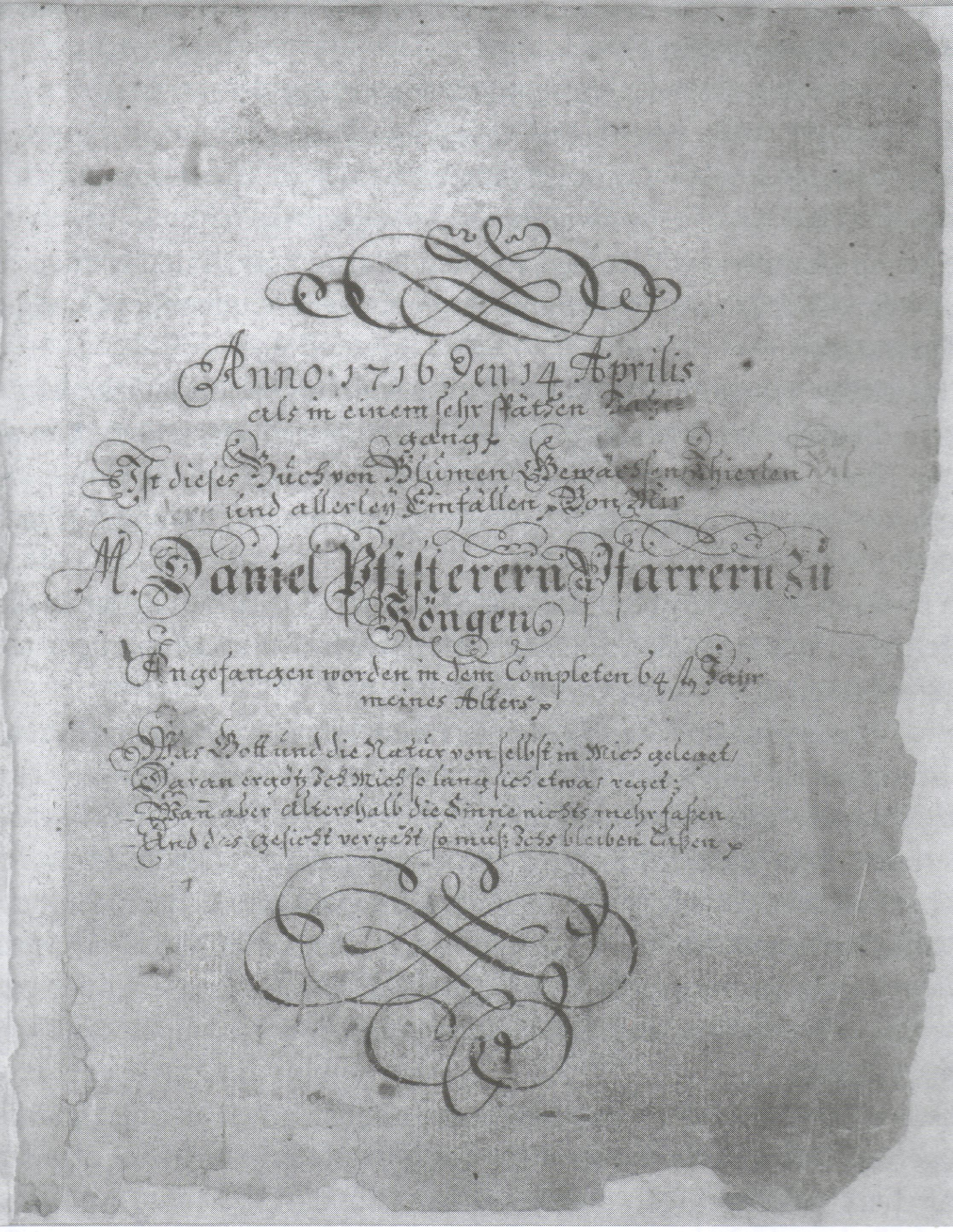 Deckblatt von Daniel Pfisterers Werk über Fauna und Flora von Köngen